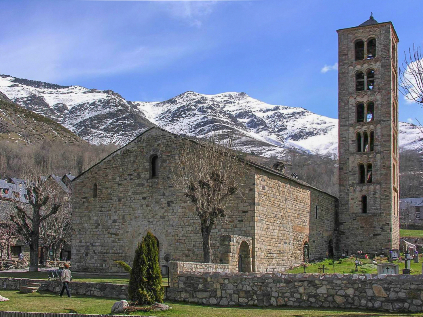 Sant Climent de Taüll: Nova visita, ara amb el fons nevat